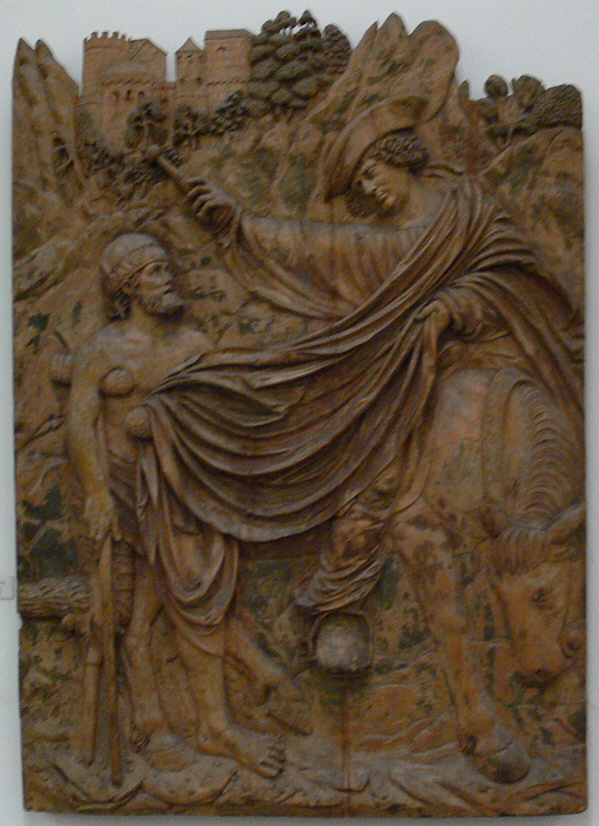 Meister von Ottobeuren: Altarflügel Der hl. Martin und der Bettler, um 1520; Vorarlberger Landesmuseum, Bregenz; aus der Kirche St. Johannes d.T. in Feldkirch